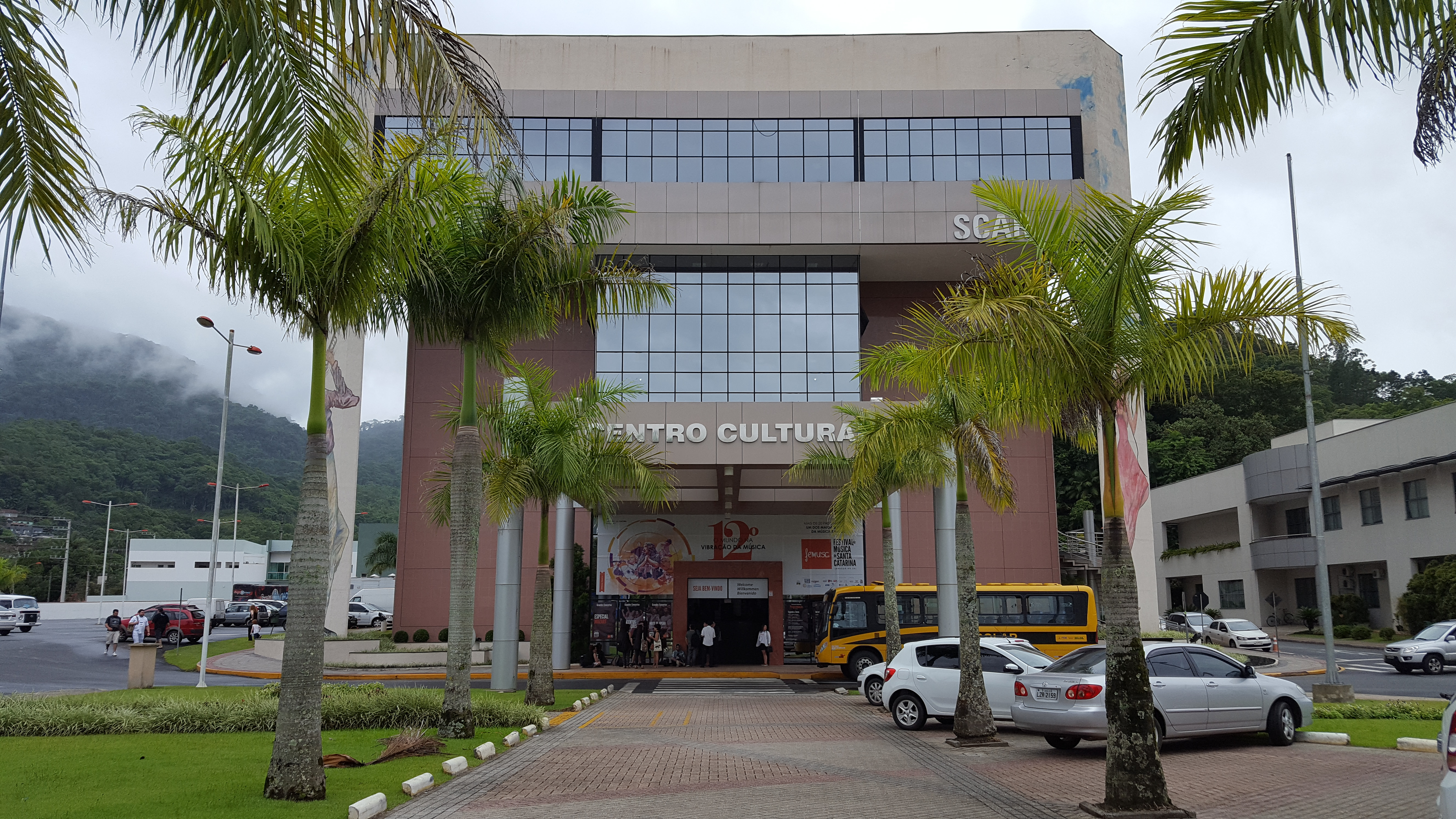 Femusc 2017, vista frontal do Scar.